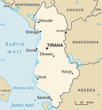 Albaania kaart